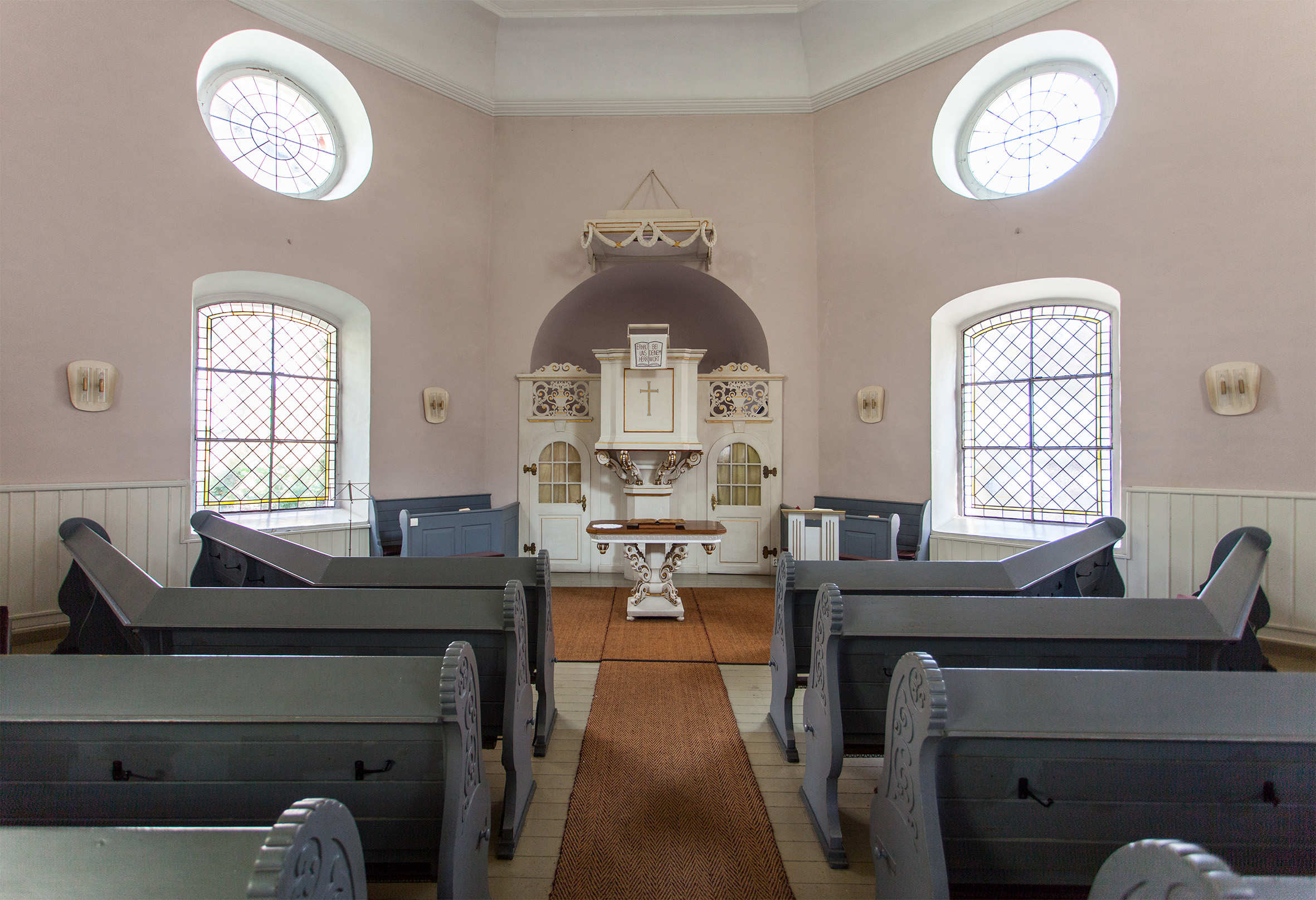 St. Johannis Kirche in Vlotho, Altarraum This is a photograph of an architectural monument.